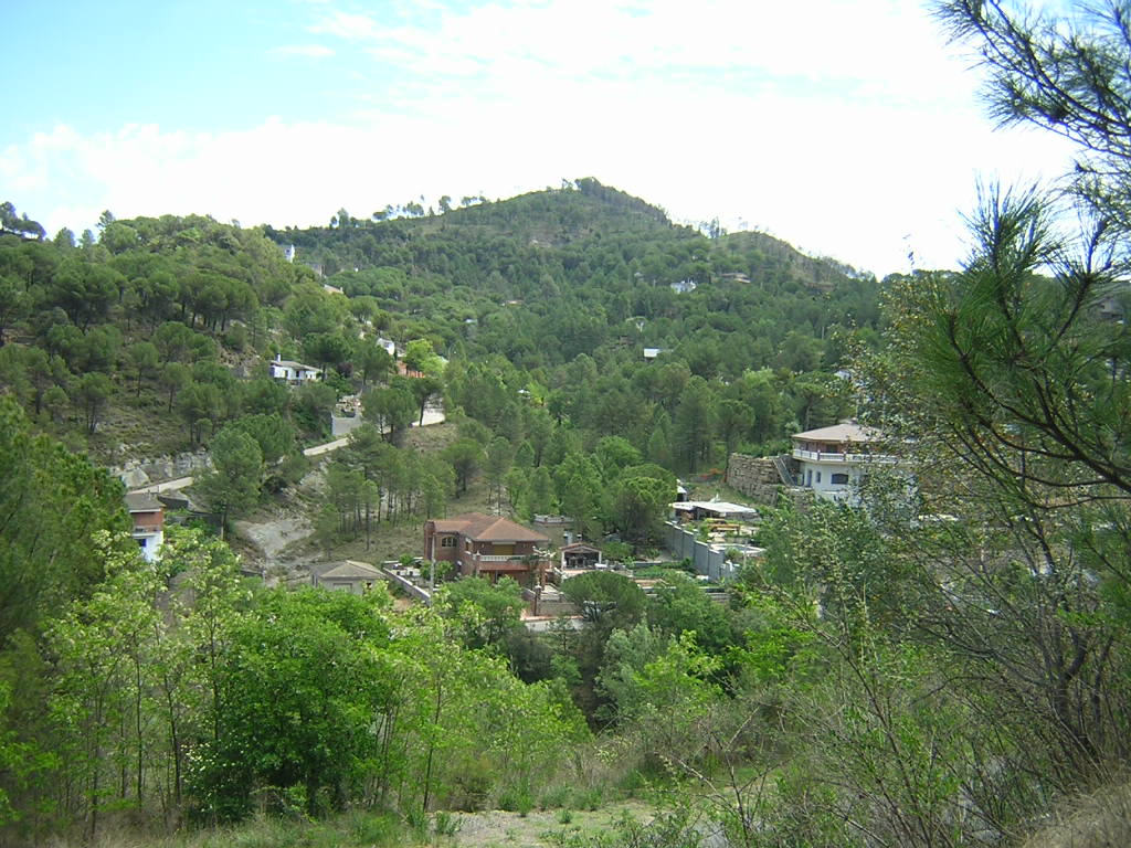 La urbanització Masia del Solà (Monistrol de Calders, Moianès)